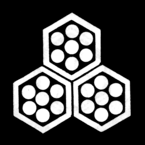 三つ盛亀甲に七曜